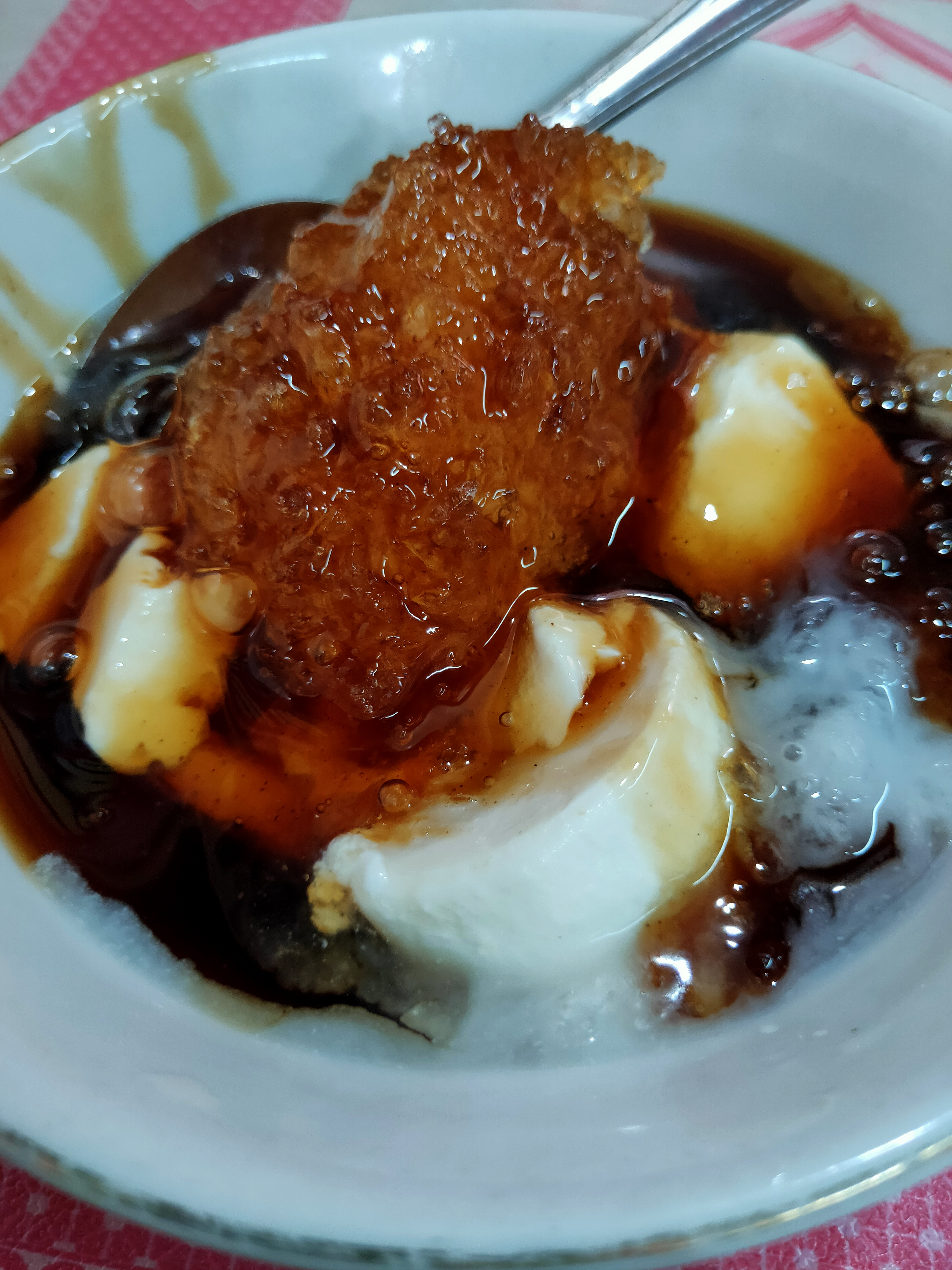 Es ampiang dadiah merupakan hasil fermentasi susu kerbau yang dicampur dengan gula merah